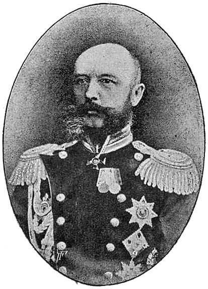 генералъ-лейтенантъ Николайъ Евстафьевичъ Барановъ